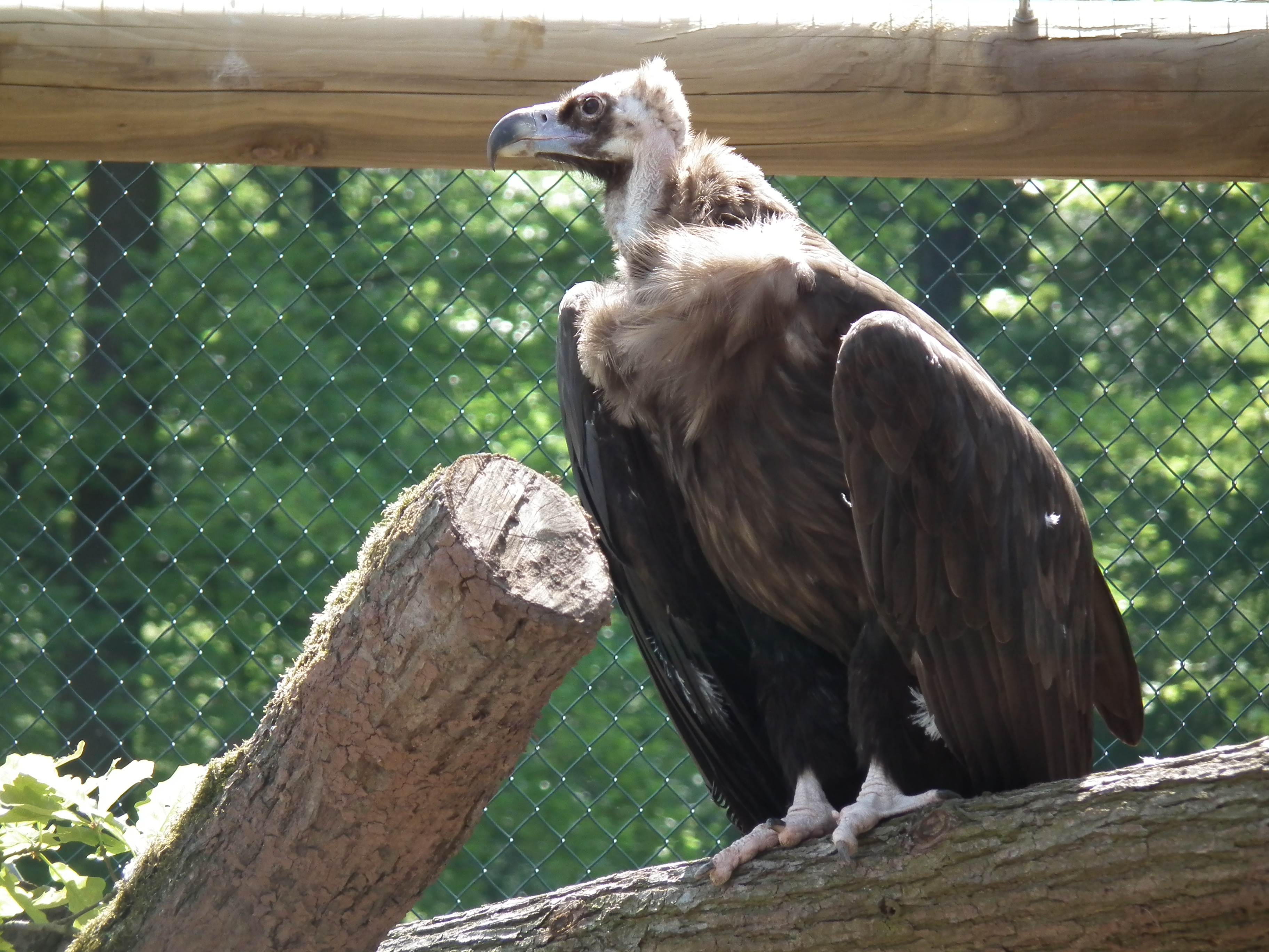 Mönchsgeier (Aegypius monachus) im Wildpark Tripsdrill (Baden-Württemberg, Deutschland)